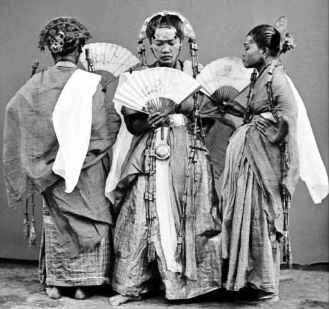 Negatief. 'Padjogé' danseressen te Maros, Celebes